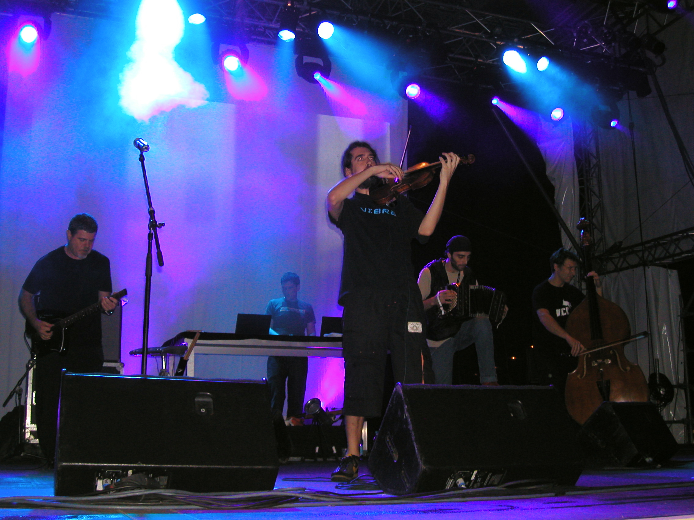 Bajofondo Tangoclub beim tff-Rudolstadt 2006